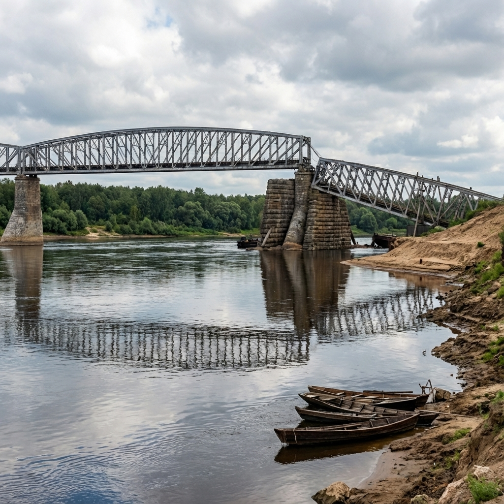 Уфимский ж/д мост 1919 (Ufa rail bridge1919)